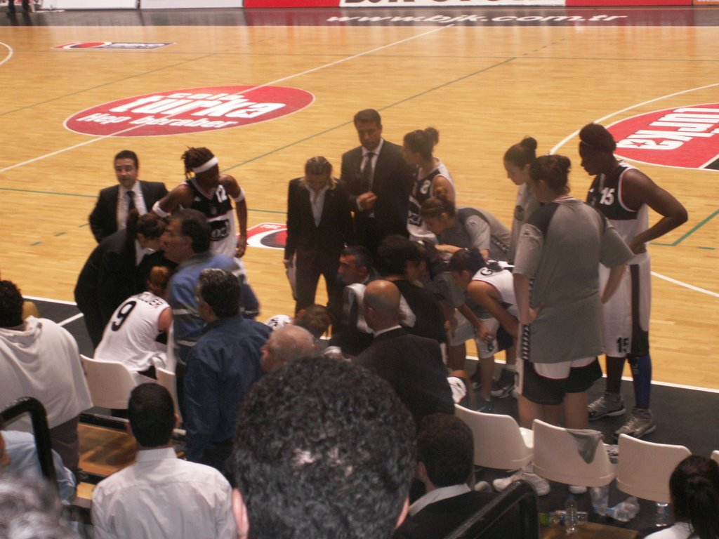 Women basketball at Besiktas J.K. Akatlar Center